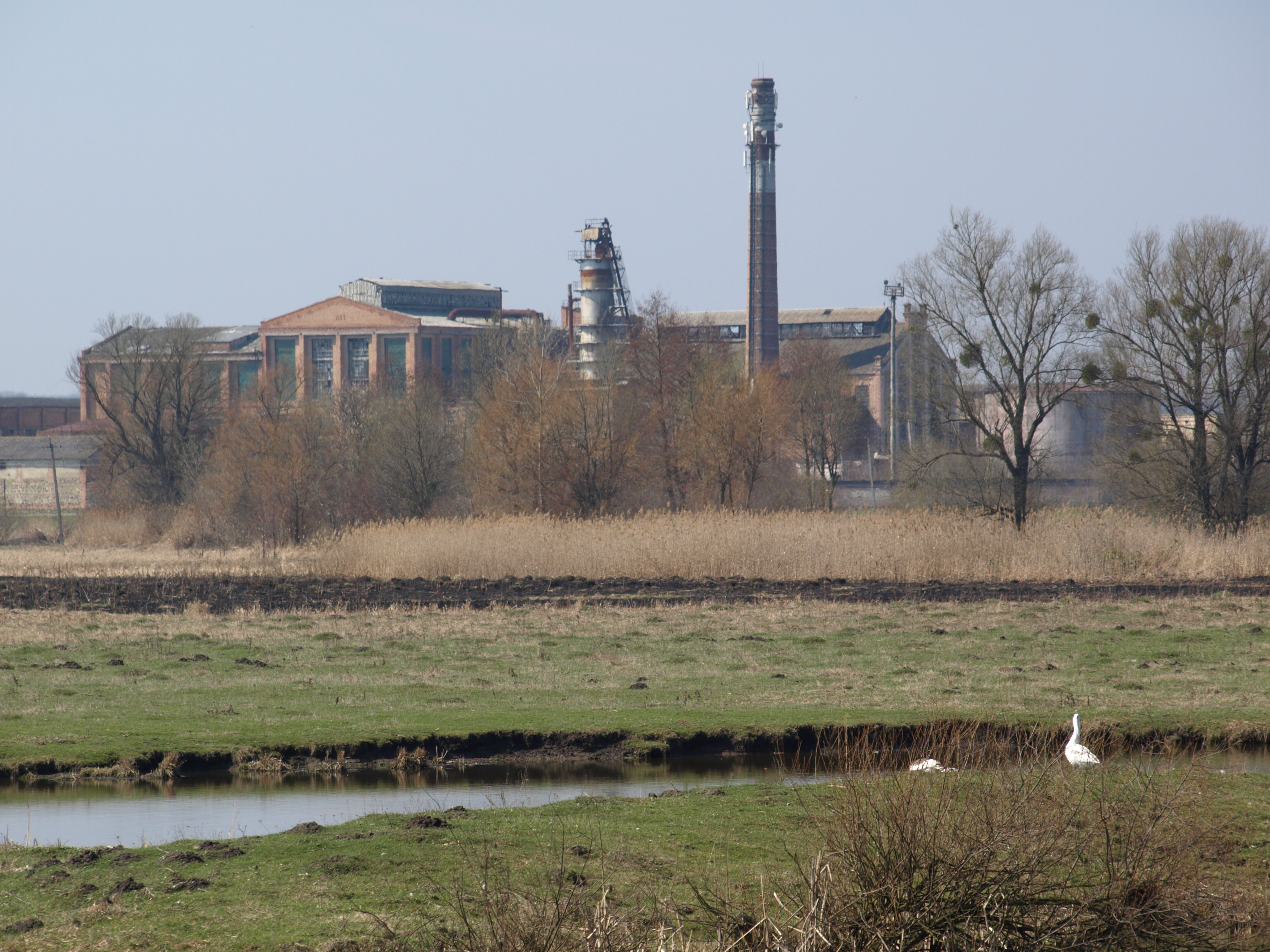 Бук європейський, Літинський район, Уладівська сільська рада, Уладівське лісництво, кв.67 поблизу с. Гущинці